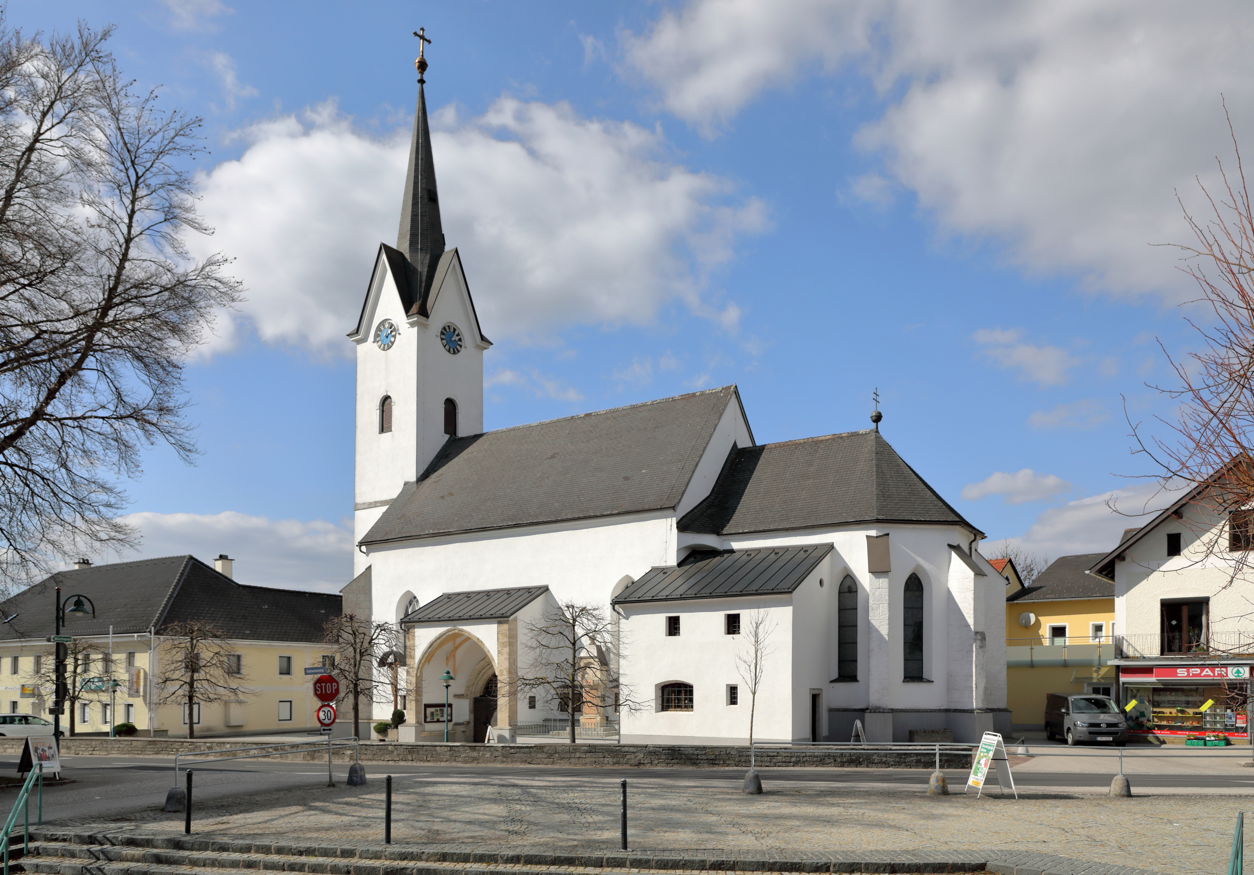 Südostansicht der röm.-kath. Pfarrkirche hl. Katharina in der oberösterreichischen Gemeinde Gschwandt. Die spätgotische Landkirche mit einem dreijochigen Langhaus und eingezogenem Chor wurde um 1500 errichtet.